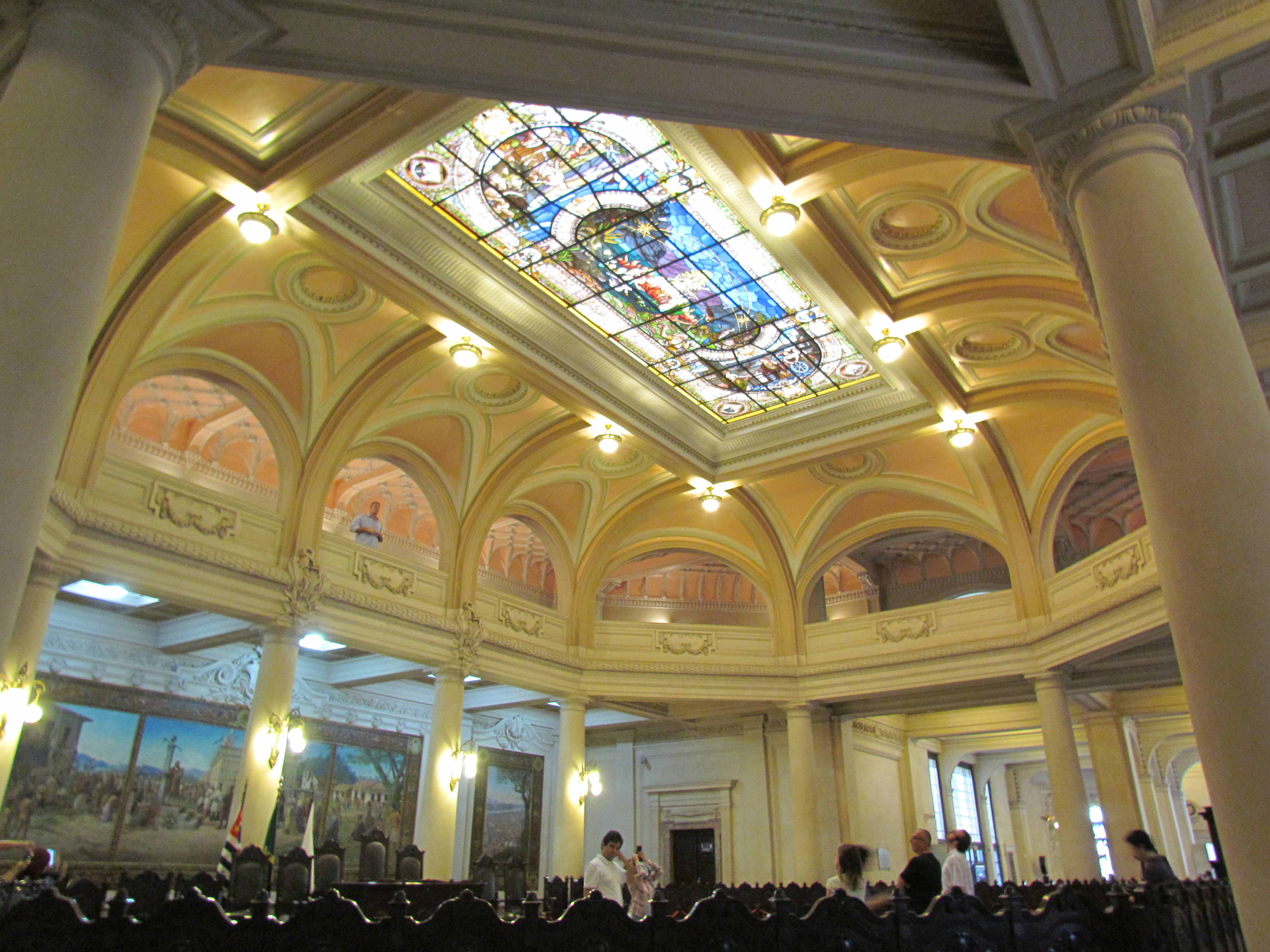 Edifício da Bolsa Oficial do Café- a beleza da arte no teto